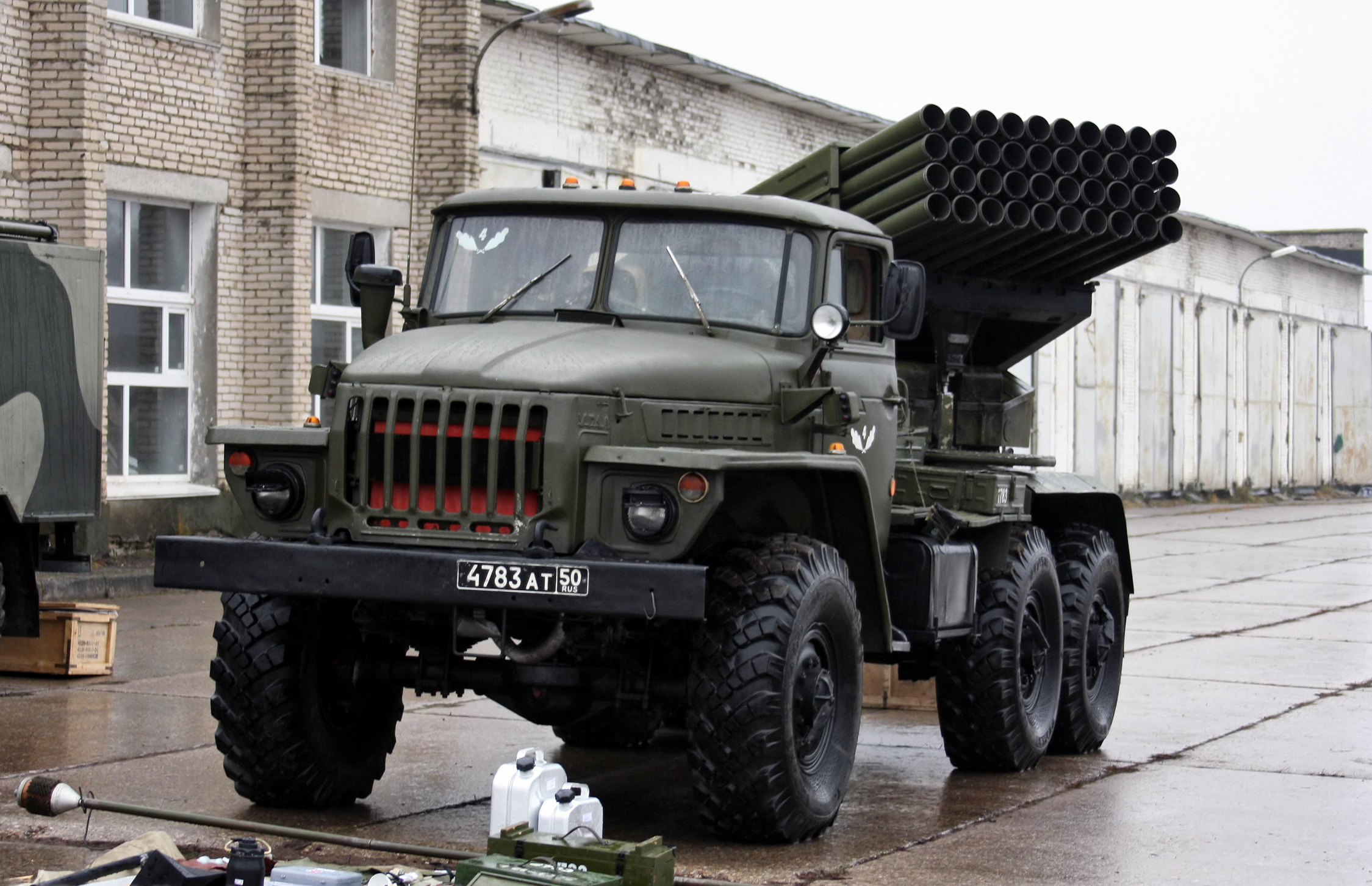 Батарея БМ-21 РСЗО Град из состава реактивного артиллерийского дивизиона бригады (Exercises with BM-21 9K51 Grad MLRS battery)